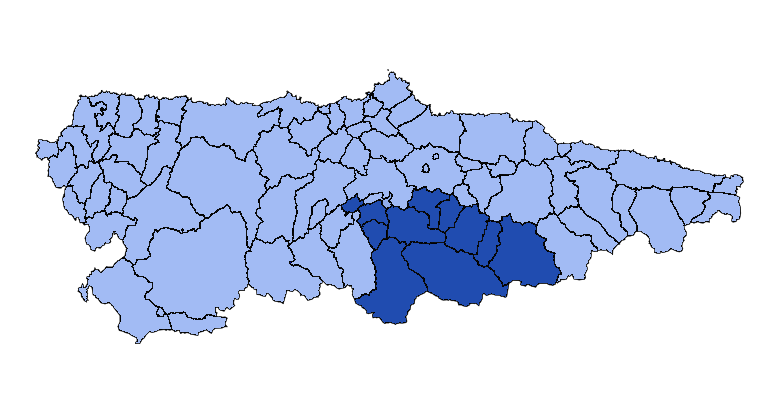 Mapa de conceyus que formen les Cuenques Mineres (Asturies)